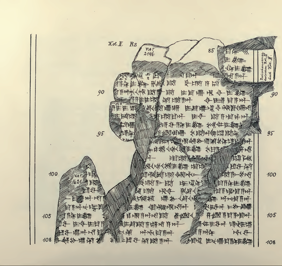 List Tuszratty do Amenhotepa III w języku huryckim – autografia.